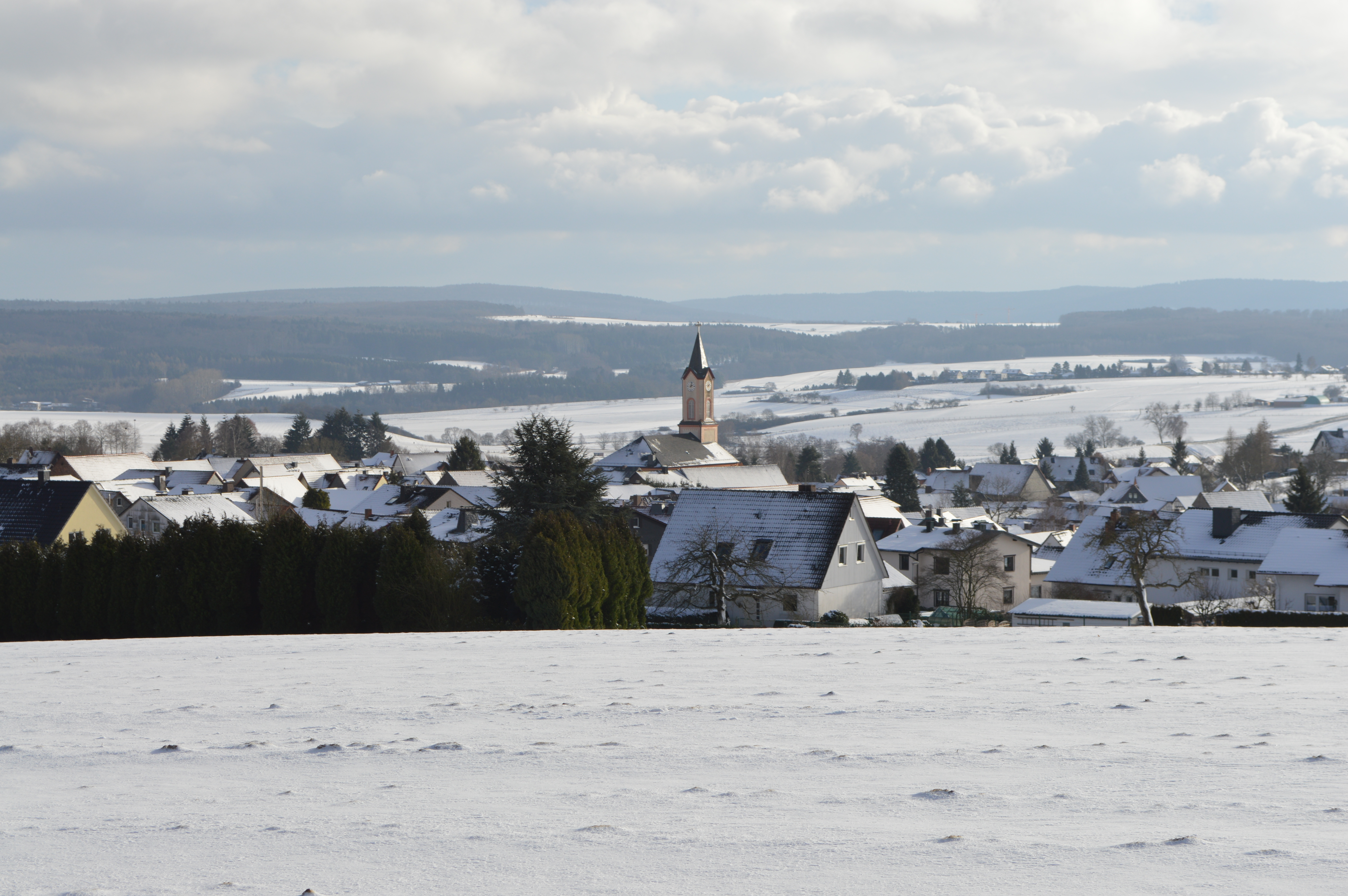 Eschbach Winter 2017